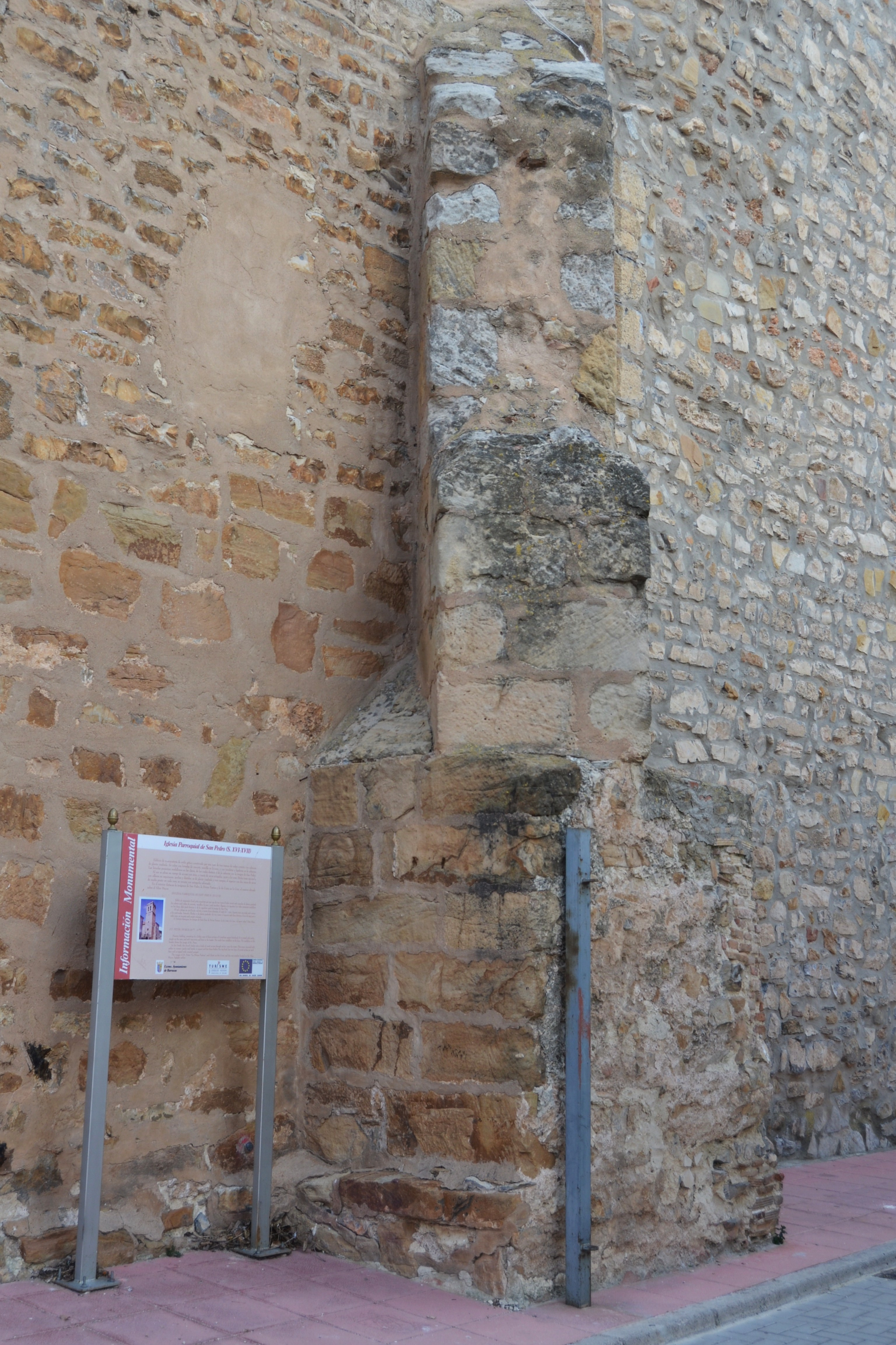 Contrafort de l'església de sant Pere, Barracas.